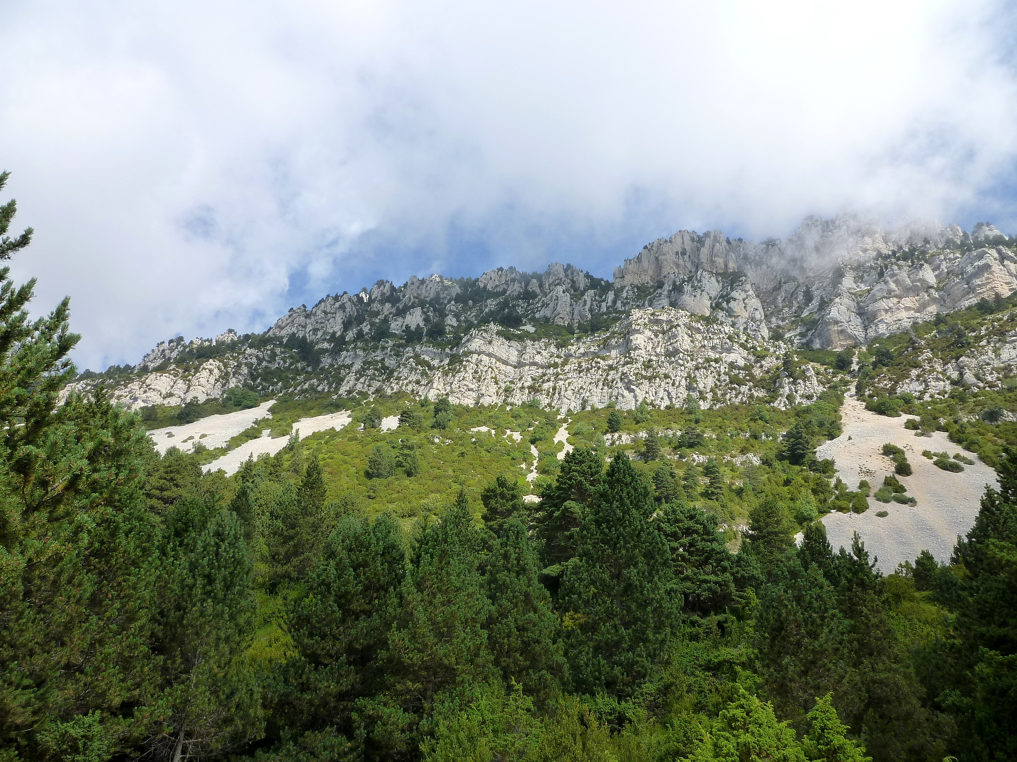 Relleu accidentat a les Rues de les Costes, des dels Cingles de les Costes, sota el Puig de les Morreres. Guixers (Solsonès - Catalunya)